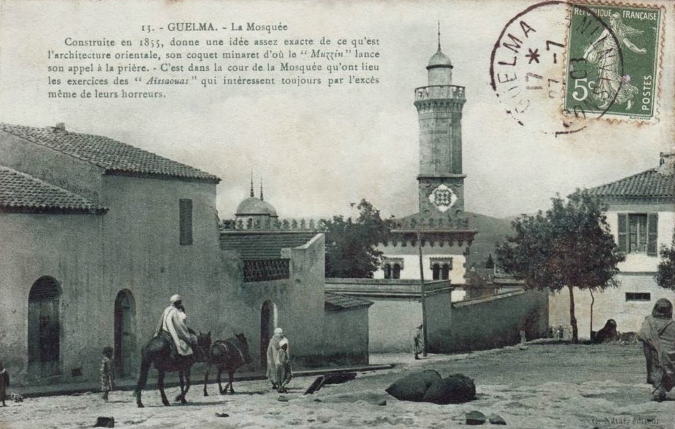 Guelma (Algérie), la mosquée ; carte postale ayant voyagé en 1903.